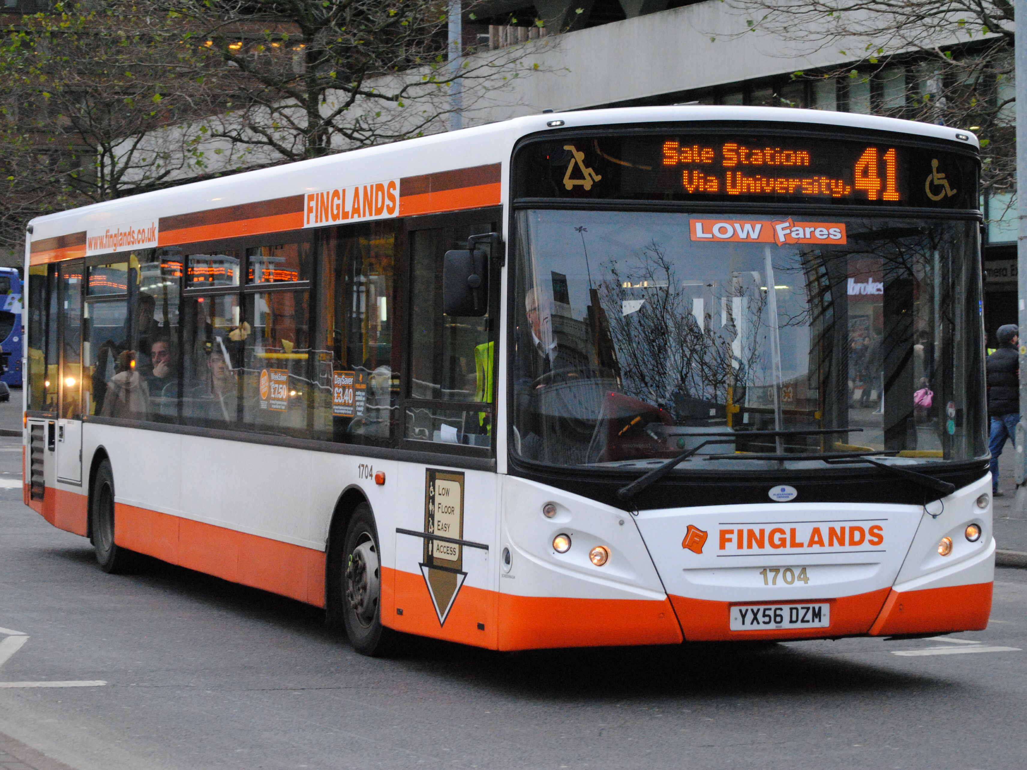 Alexander Dennis 11.8m Enviro 300